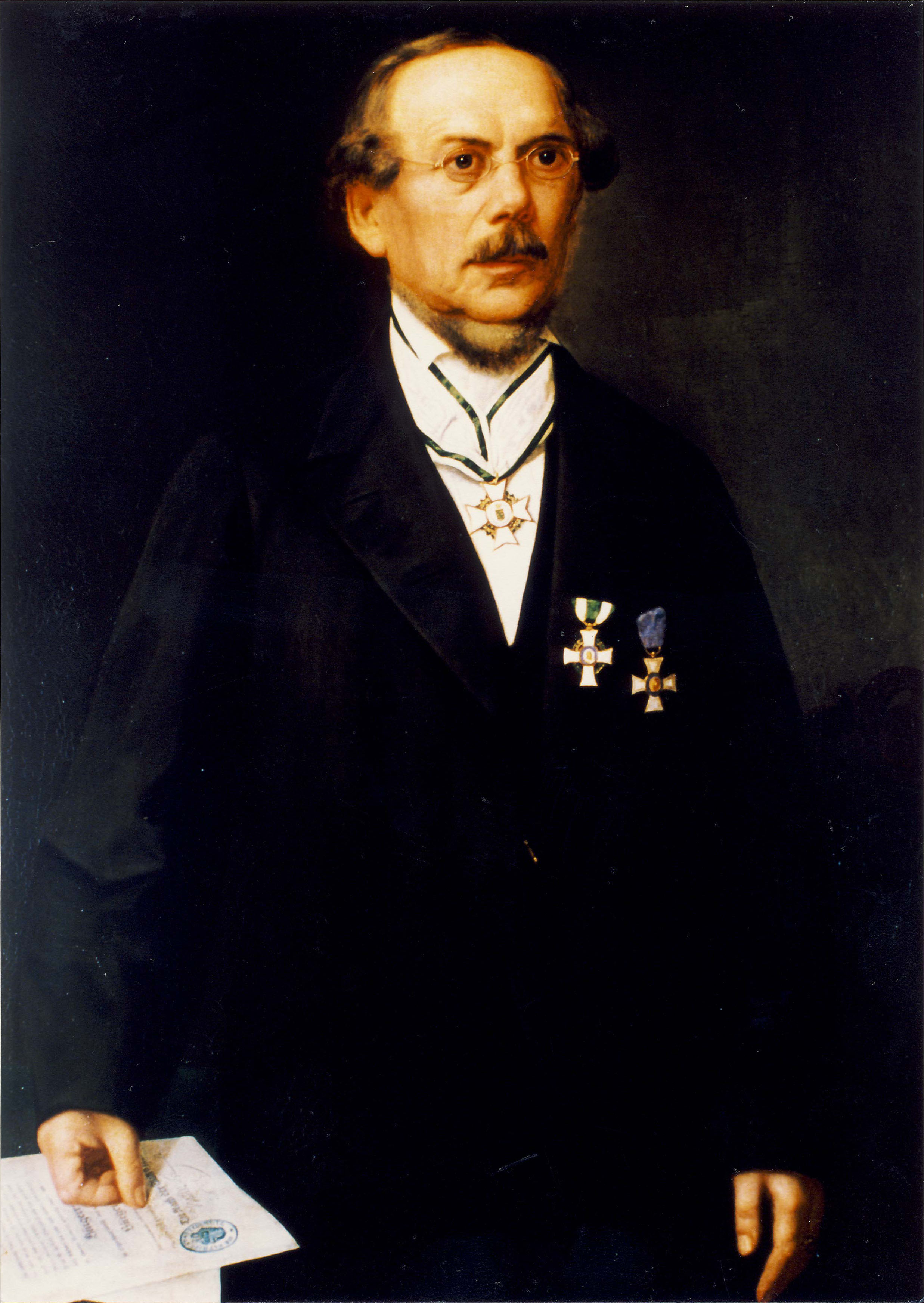 Johann Friedrich Müller, Chemnitzer Bürgermeister von 1848 bis 1874